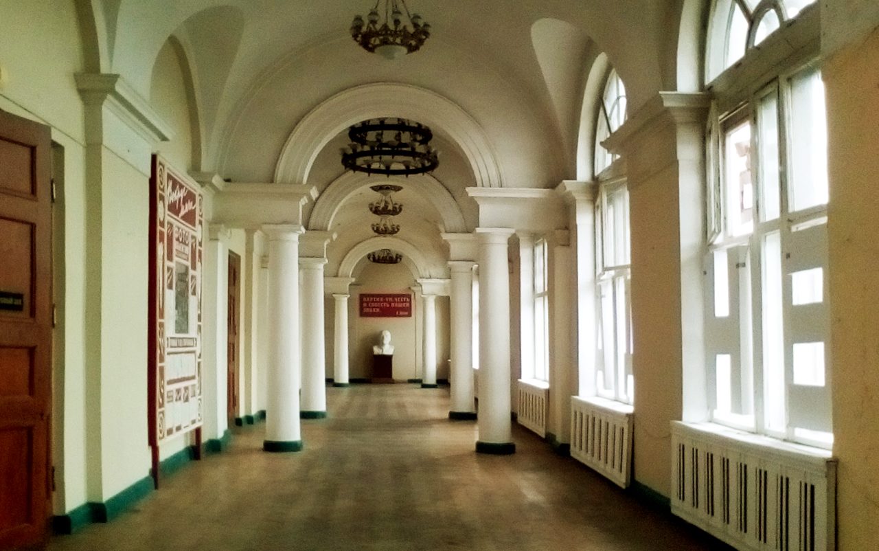 Люберцы. Октябрьский проспект 411. Главное здание бывшего Института горного дела им. А.А.Скочинского, 1951 года. Интерьер третьего этажа. 2018г.